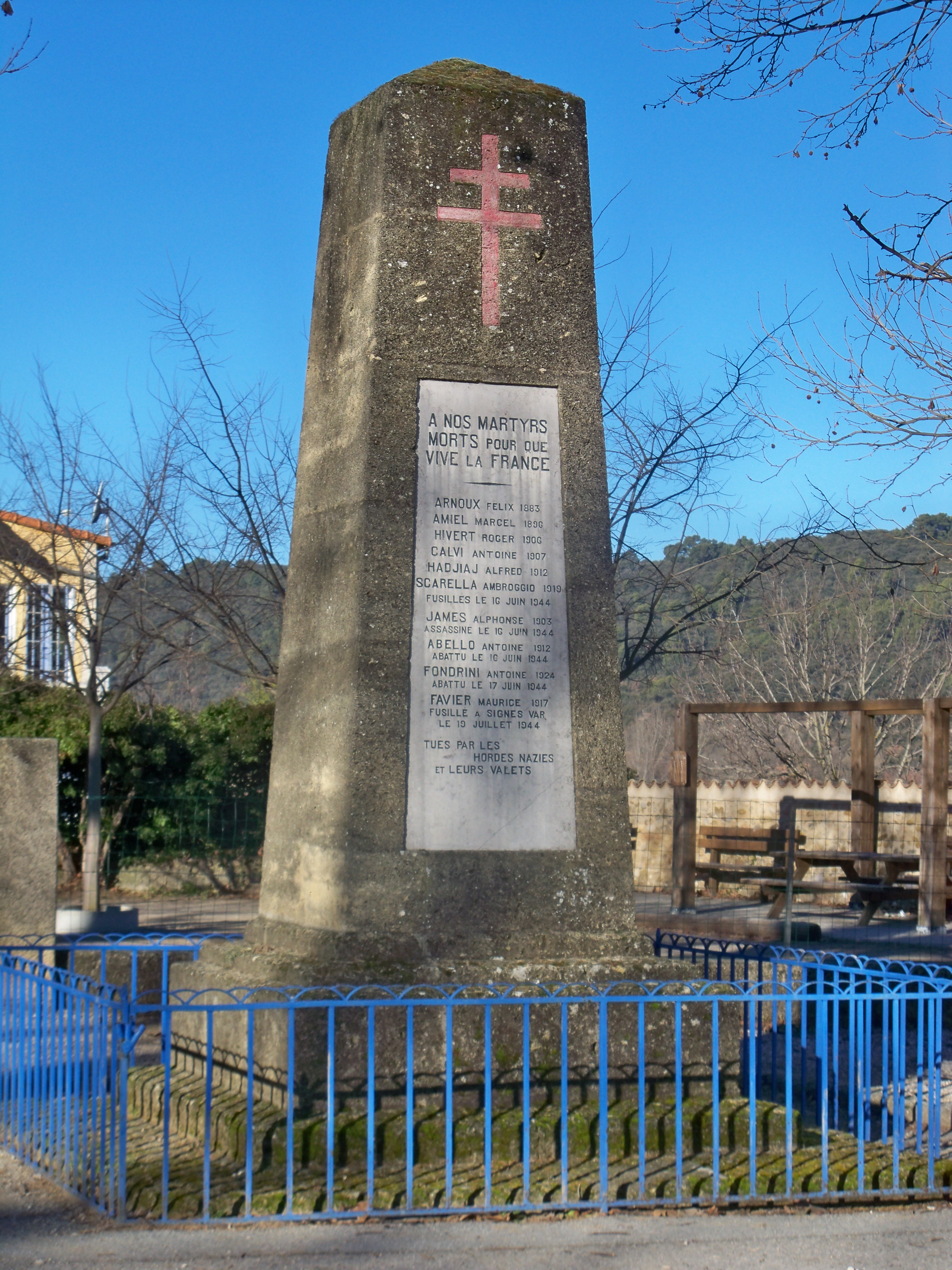 Monument aux Morts d'Allemagne en Provence (04), France